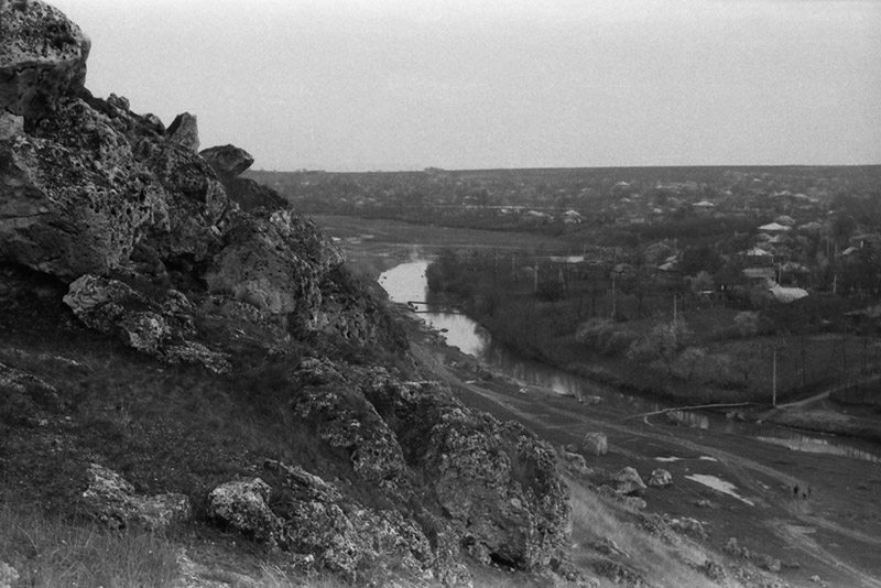 Glodeni district.